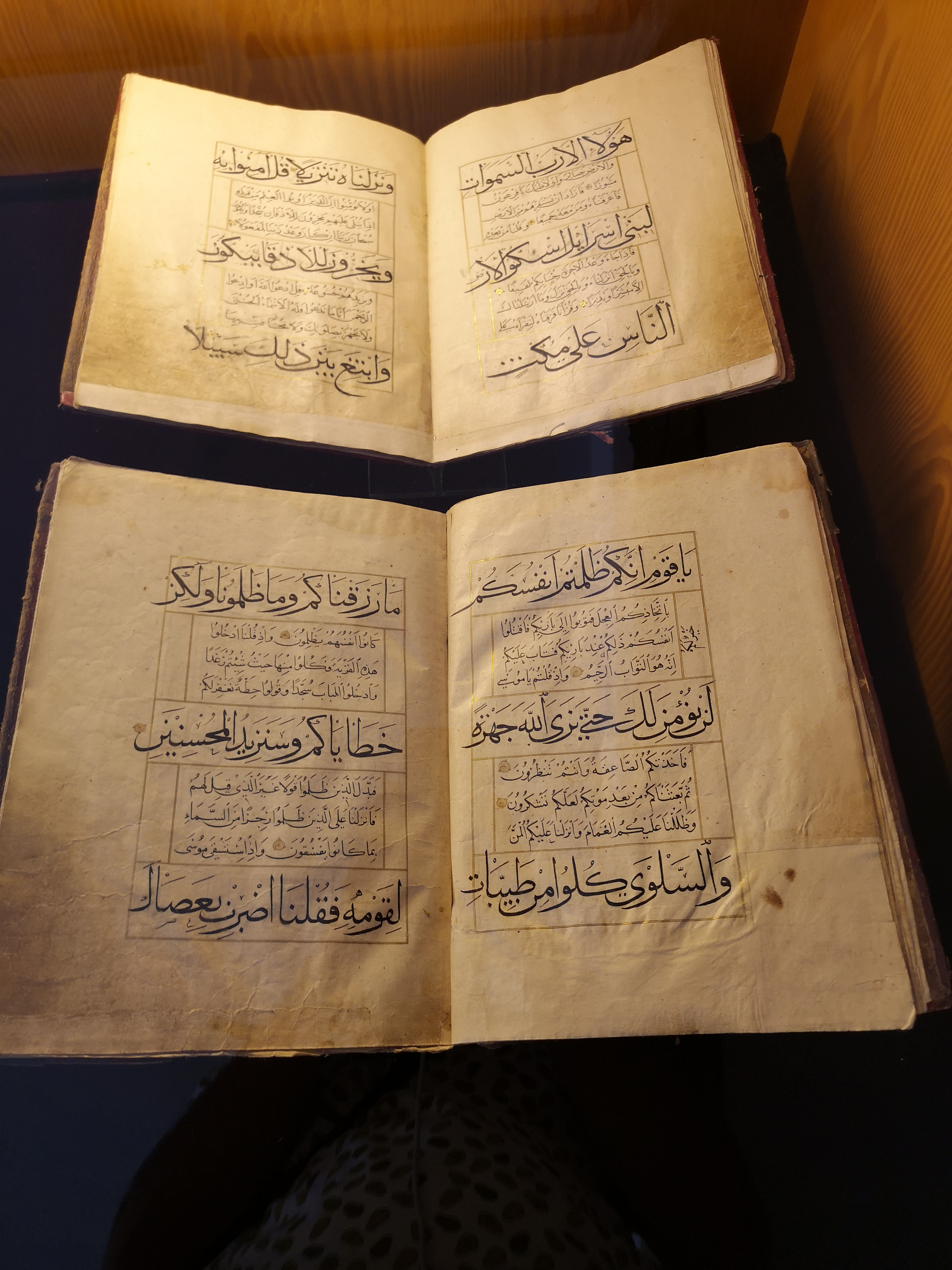 Müze içinde bulunan el yazması Kur'an'lar.